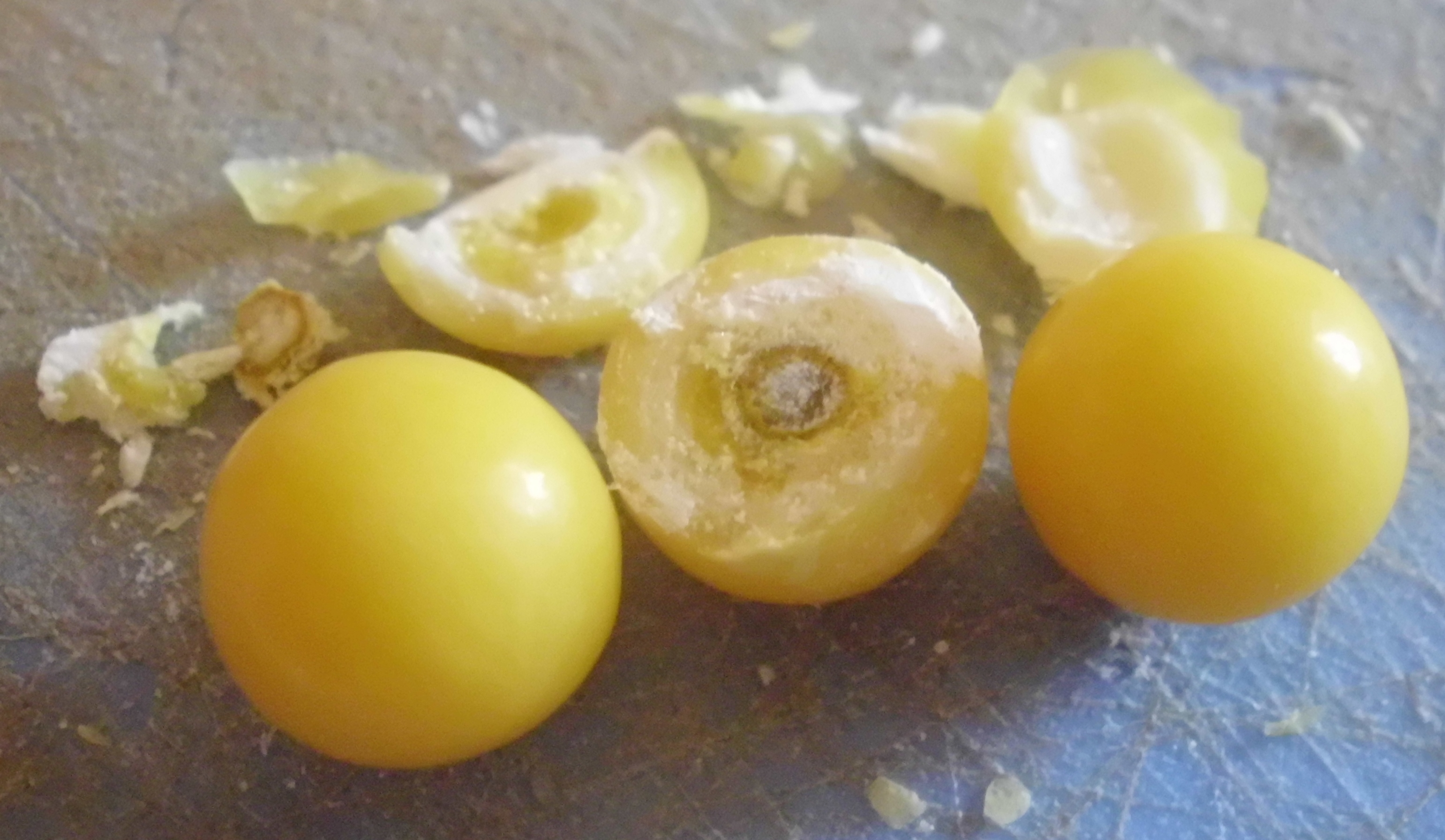 Драже с гексавитом. На сколе драже видна слоистая структура. Драже содержит послойно нанесённые для защиты от химического взаимодействия действующие вещества: ретинола ацетата 0,00172 г (5000 ЕД) или ретинола пальмитата 0,00275 г (5000 МЕ), тиамина хлорида 0,002 г или тиамина бромида 0,0026 г, рибофлавина 0,002 г, никотинамида 0,015 г, пиридоксина гидрохлорида 0,002 г, кислоты аскорбиновой 0,07 г.